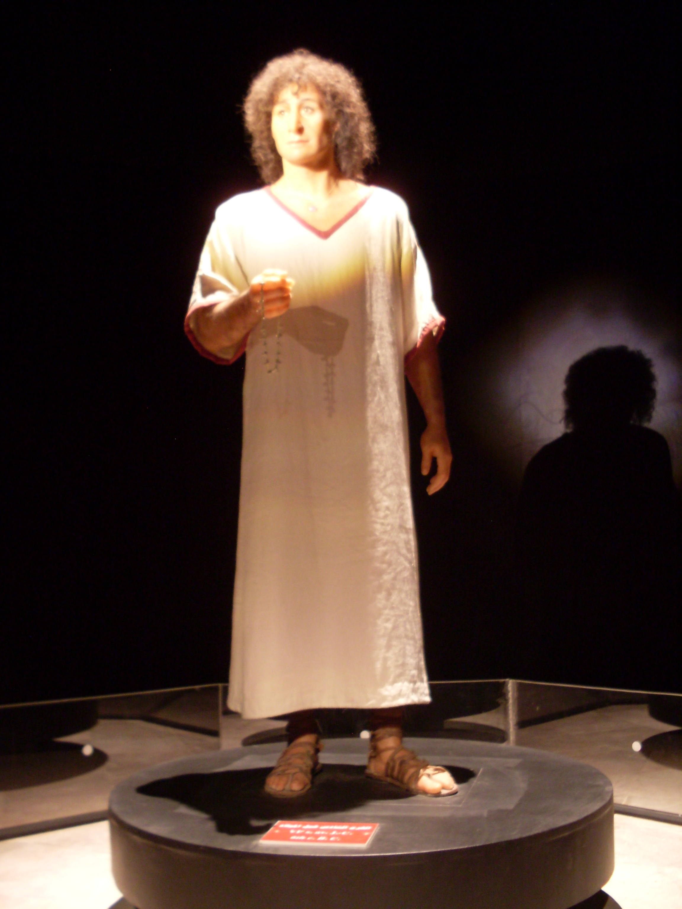 Reconstitution du squelette du jeune de byrsa